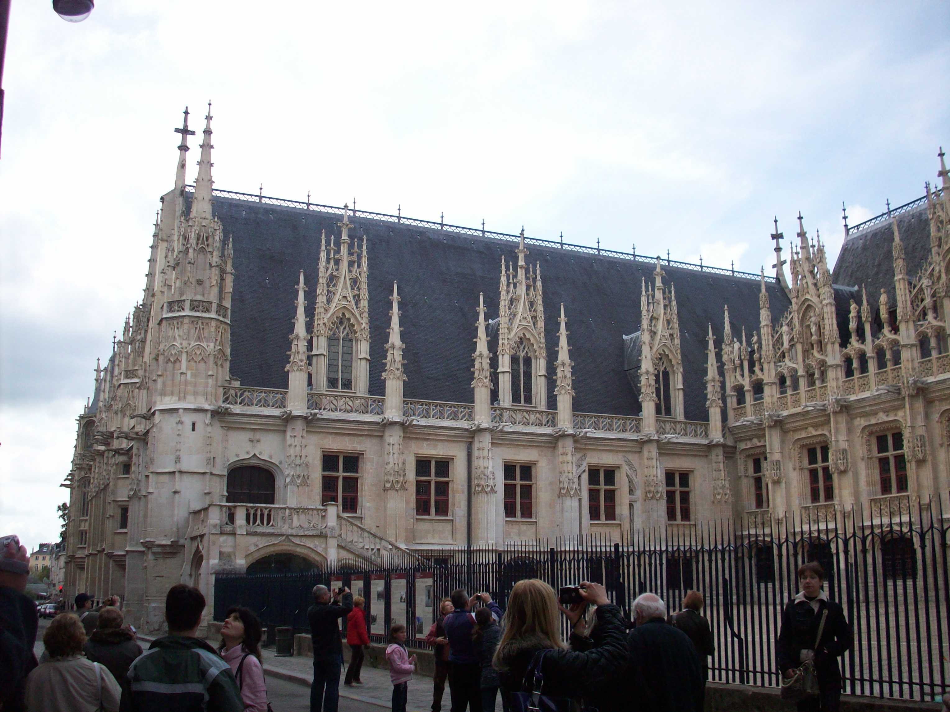 Palais de justice vu depuis la rue aux Juifs.